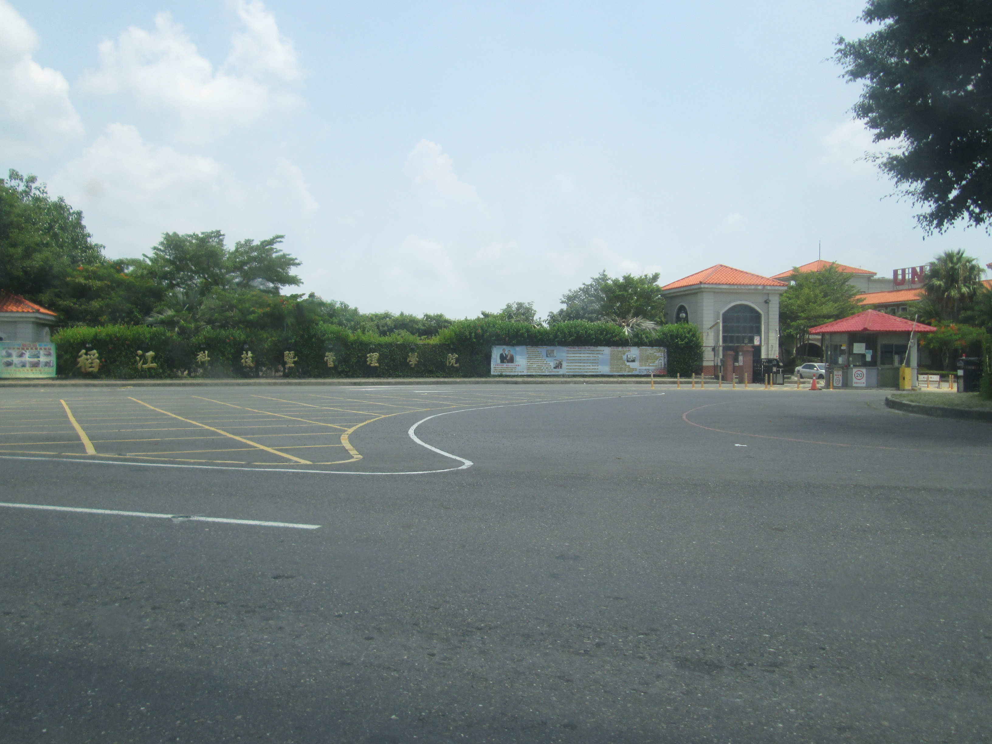 嘉義縣朴子市 稻江技術學院